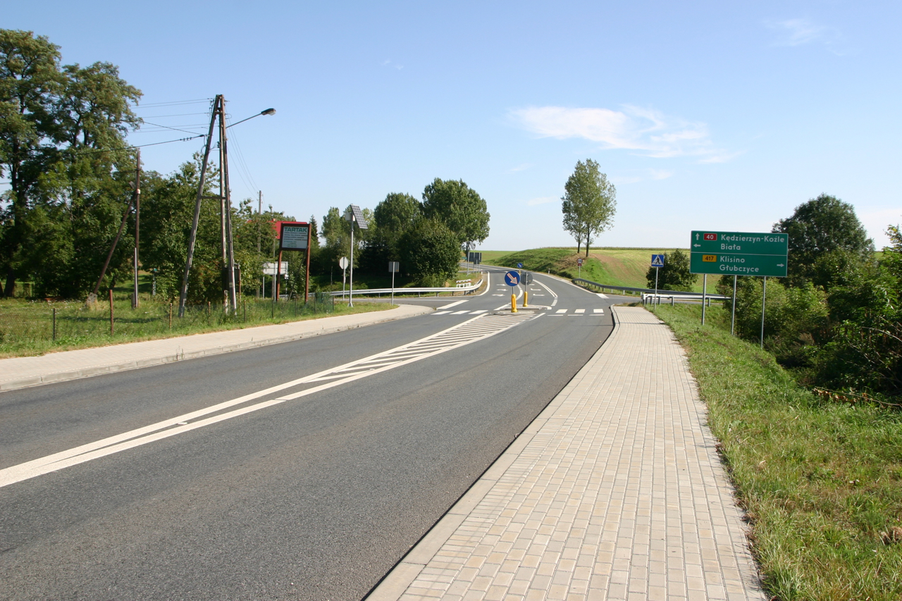 Laskowice – wieś w Polsce położona w województwie opolskim, w powiecie prudnickim, w gminie Lubrza.